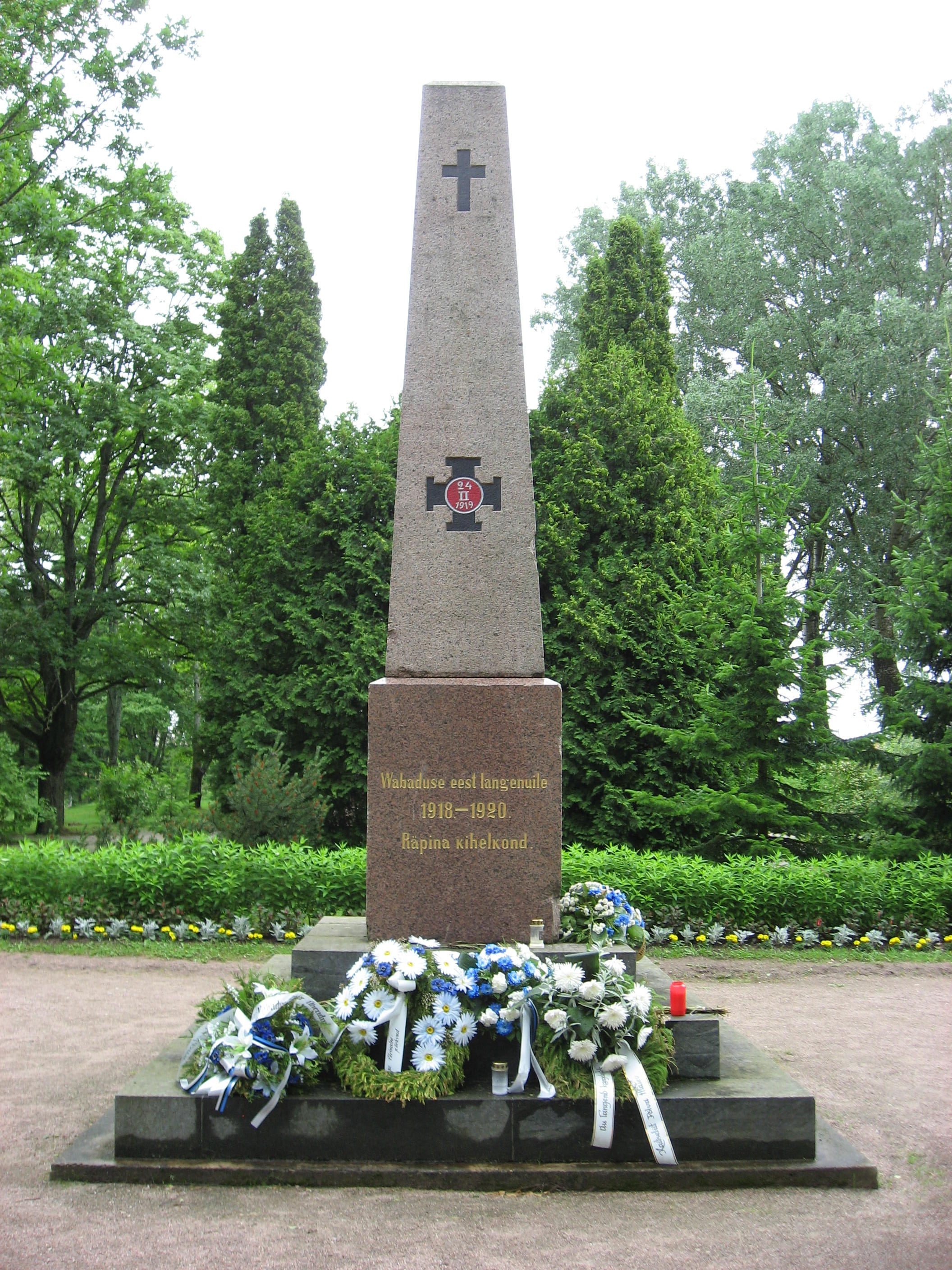 Võro: Räpinä Vabahussammas